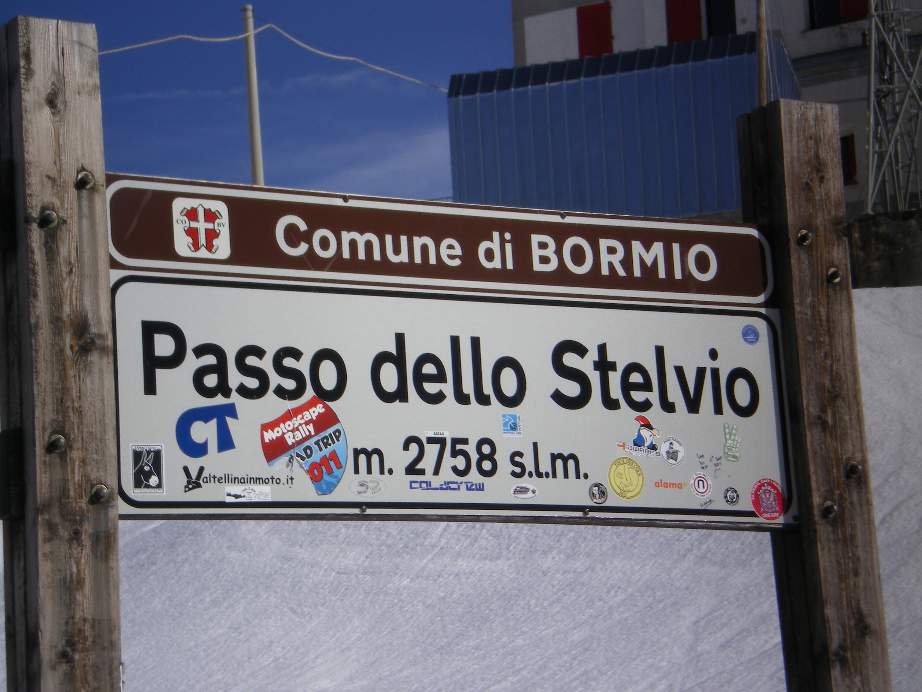 פסגת מעבר סטלביו